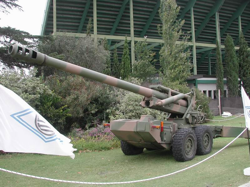 El Cañón de 155 mm L 45 CALA 30 es un cañón de artillería de campaña de largo alcance